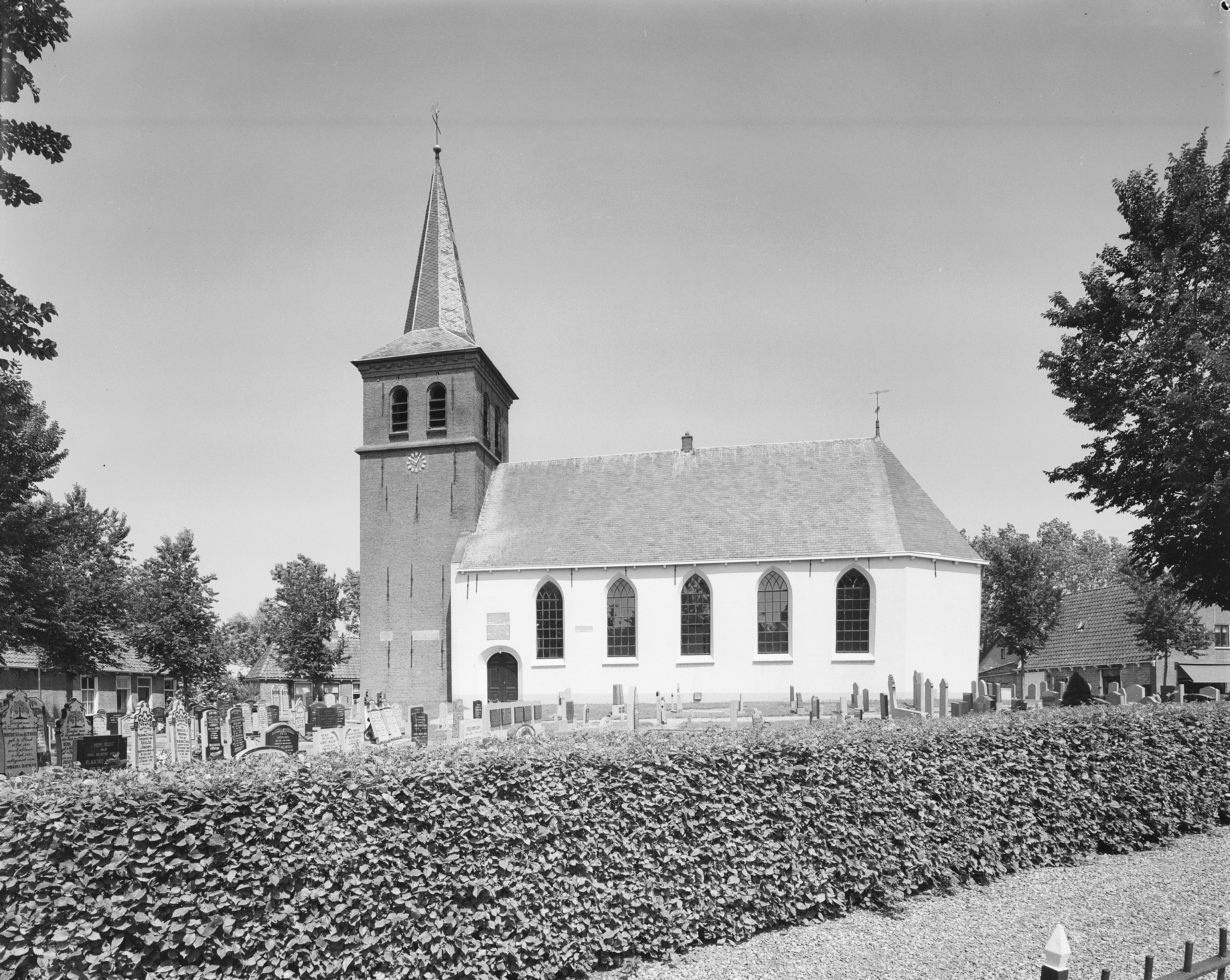 Nederlands Hervormde Kerk: Exterieur ZUIDGEVEL